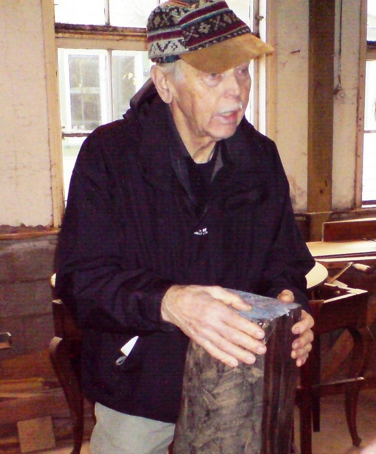 John Bjerga med et stykke ibenholt på sitt verksted over butikken i Stavanger.